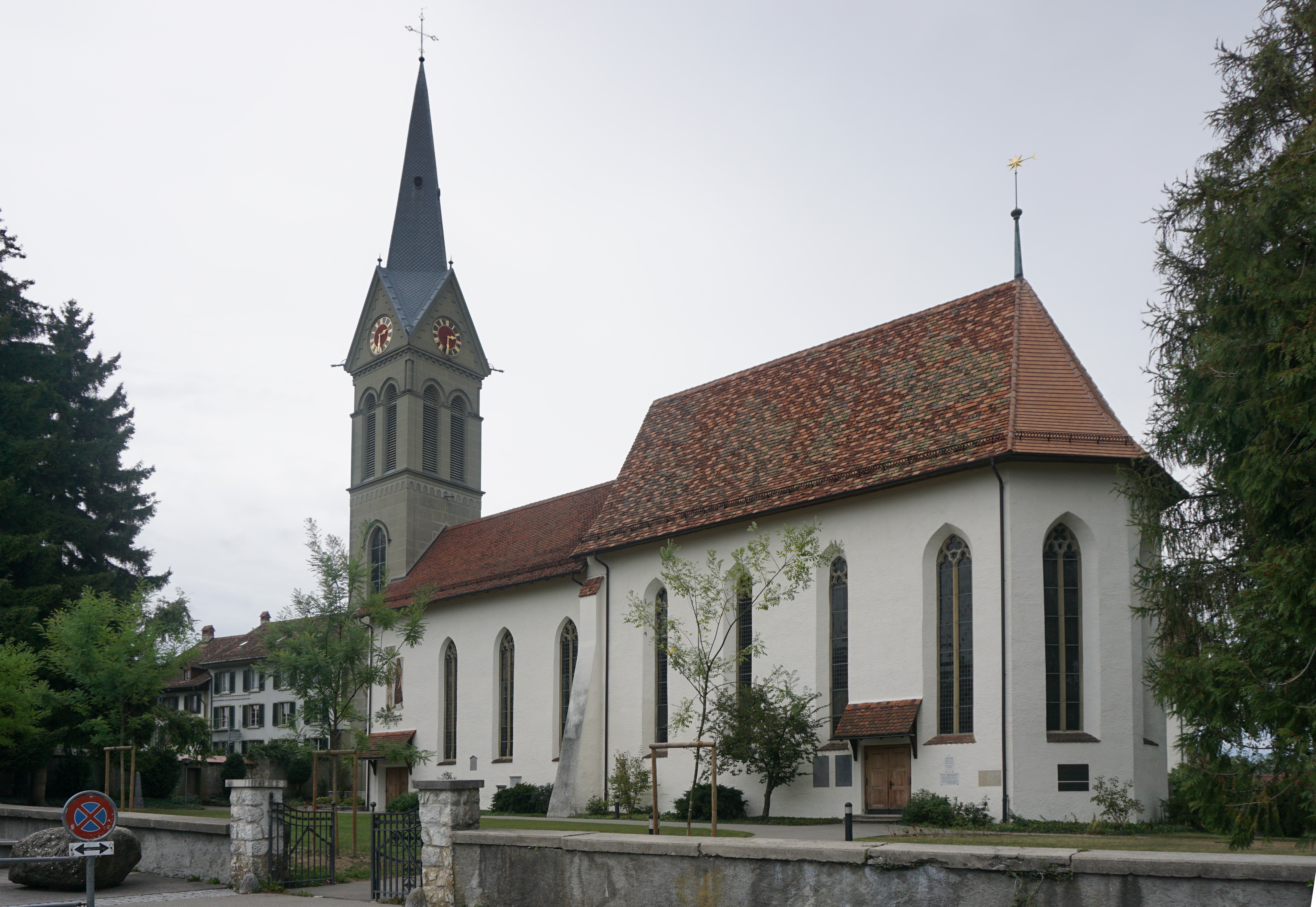 Kirche Münchenbuchsee von Südost.